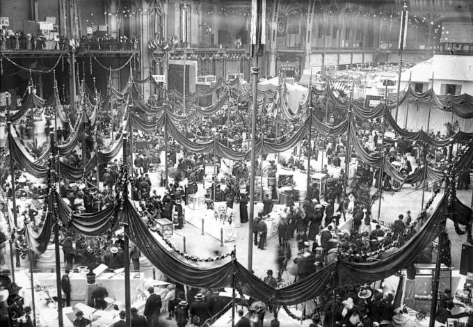 Vue d'ensemble des stands du Concours Lépine au Grand Palais à Paris en 1912